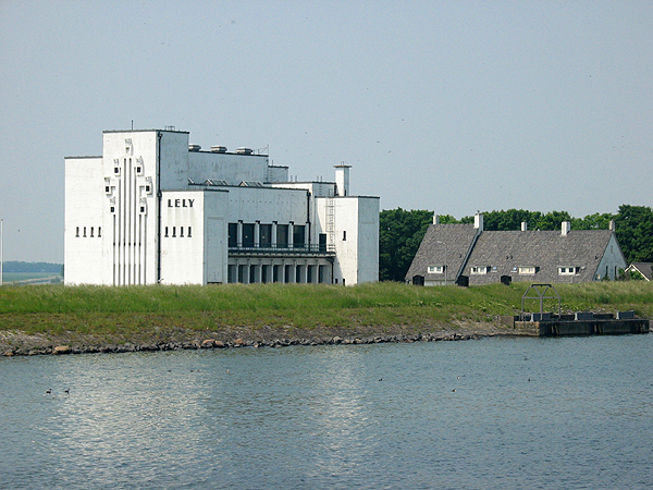 Foto gemaakt door Gerard Hogervorst